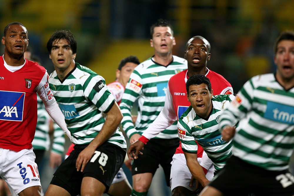 Sporting Clube de Portugal vs Sporting Clube de Braga